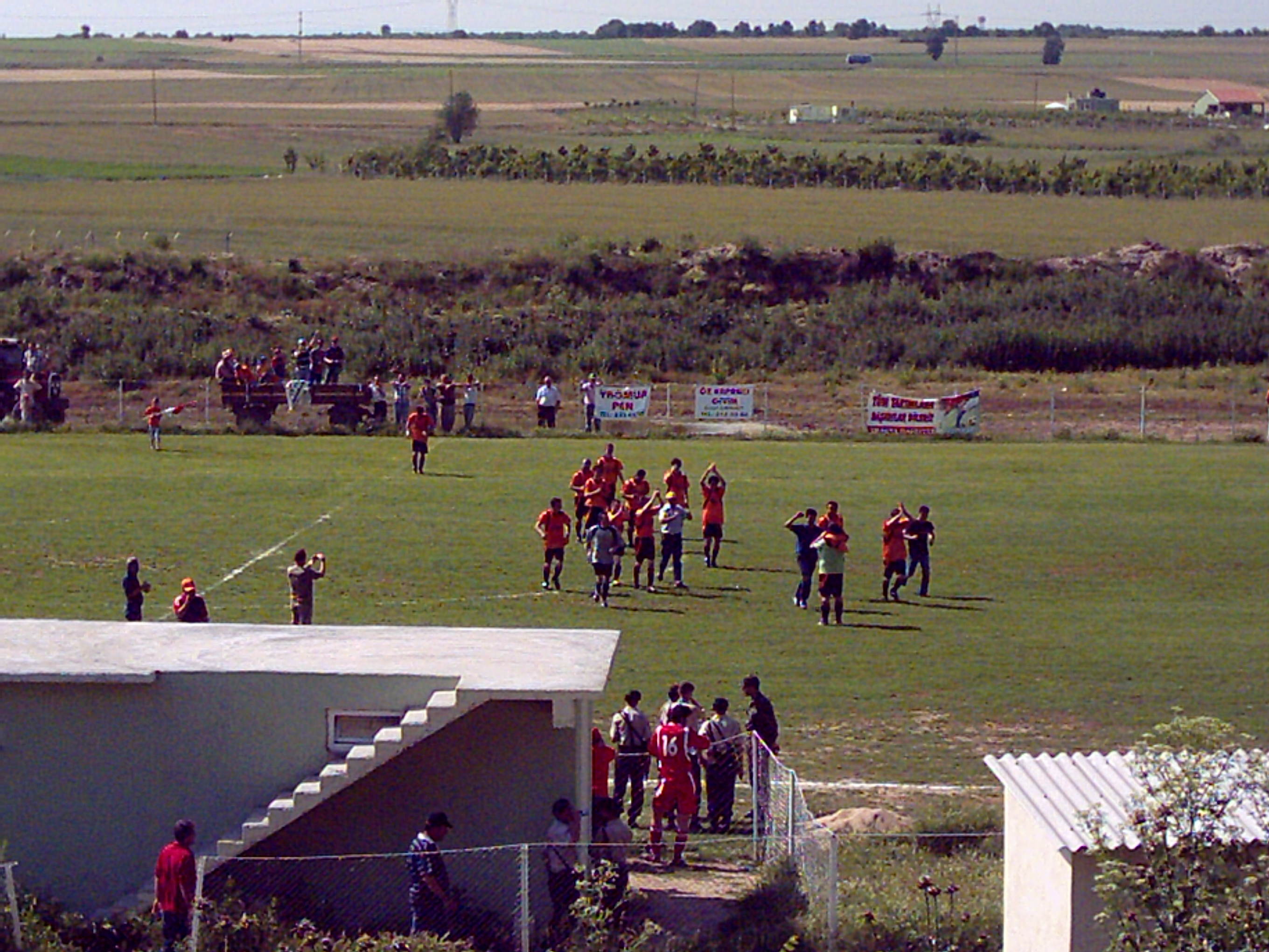 Budakdoğanca, Edirne 27.05.07-Hıdırağa maçı